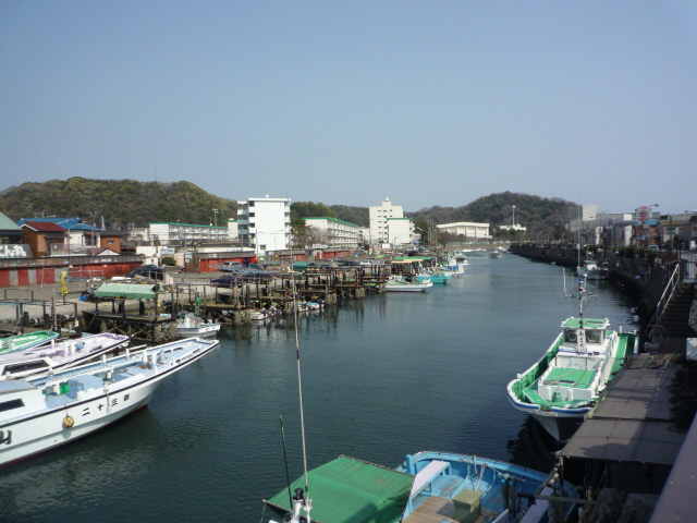 平作川下流を撮影。